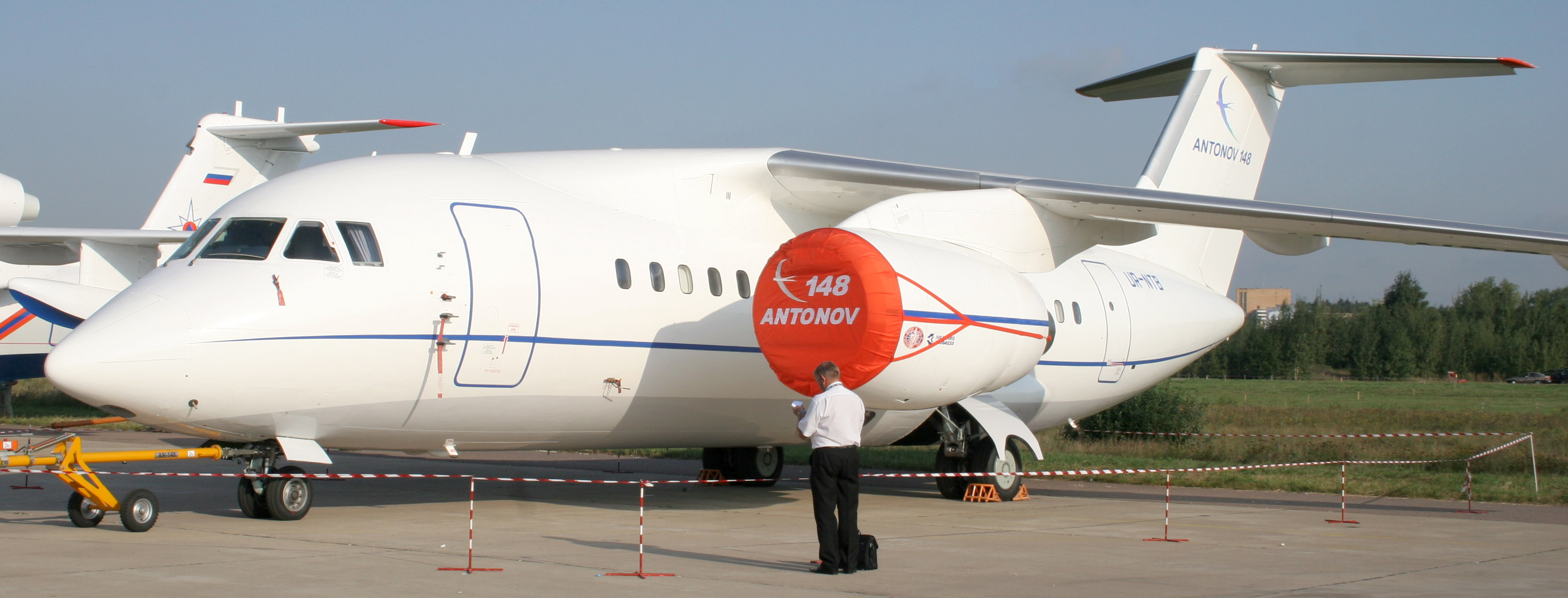 Самолёт Ан-148. Экспозиция на МАКС-2007